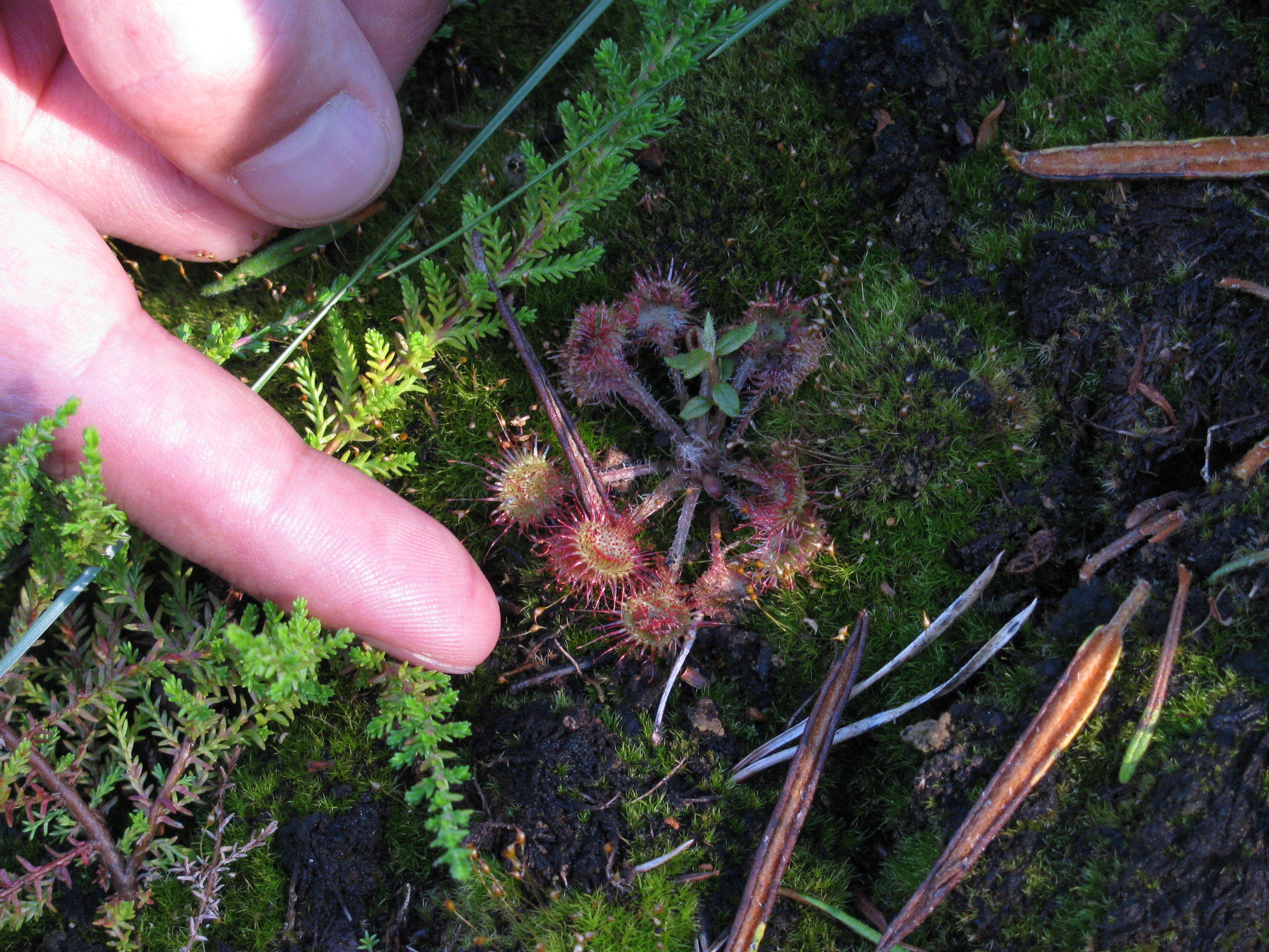 Huulhein Tõnumaa rabas